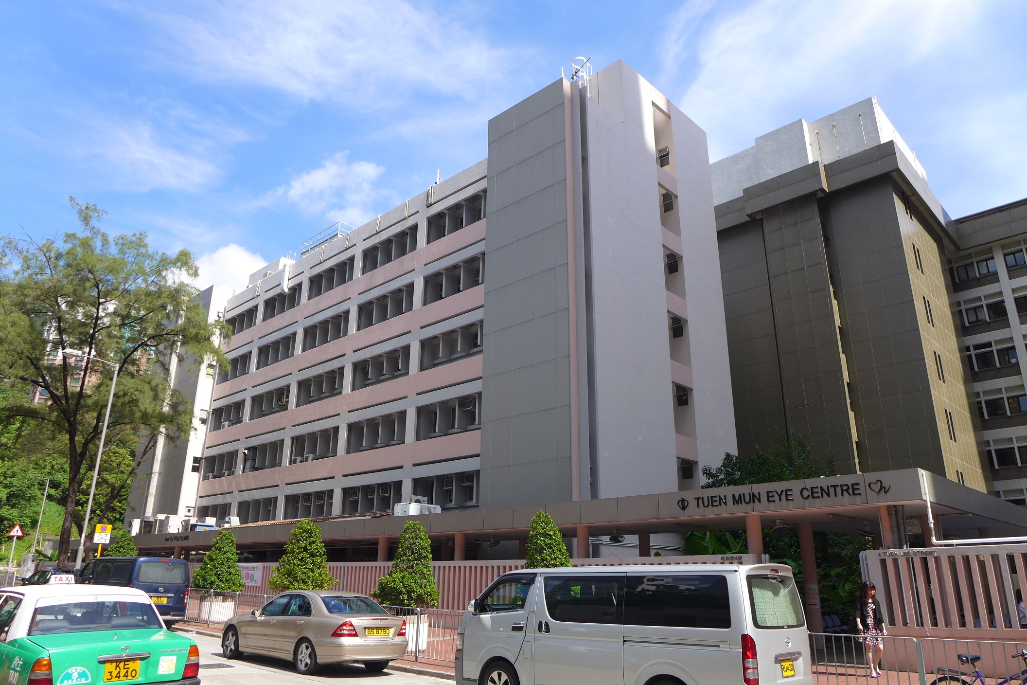 Yan Oi Polyclicnic